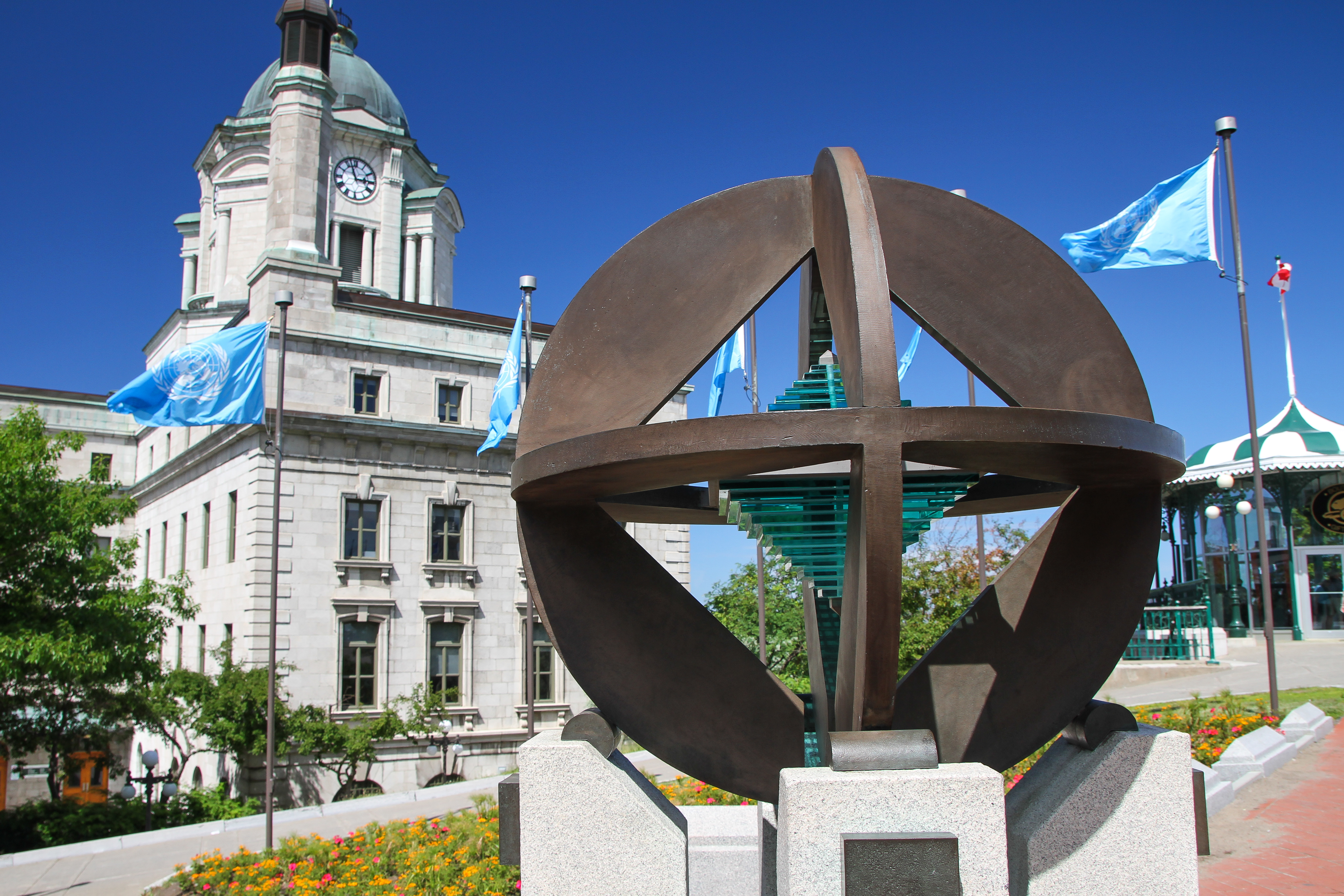 Monument de l'UNESCO avec l'ancien bureau de poste en arrière-plan, Québec